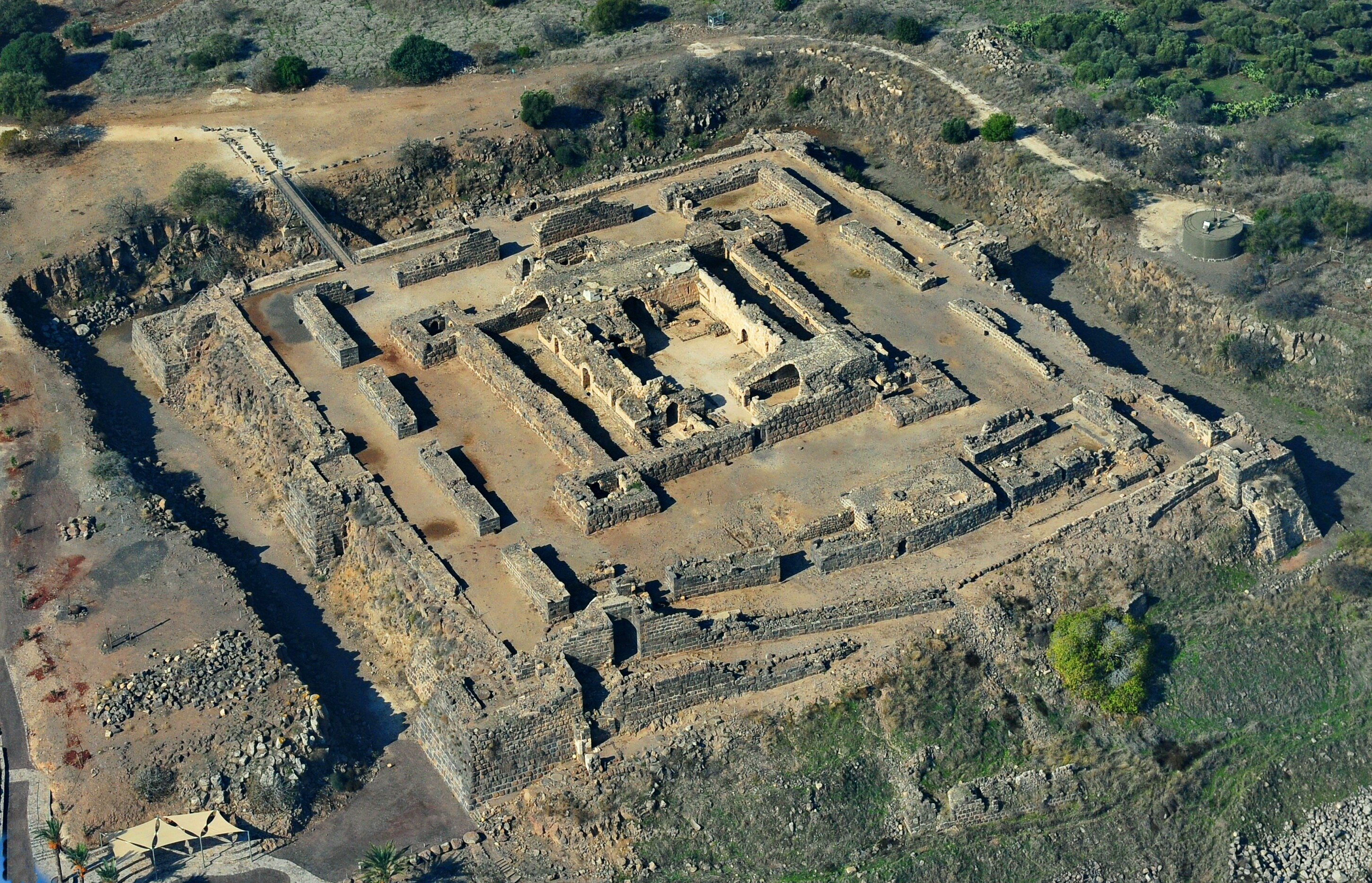 כוכב הירדן (ידוע גם בשמות יפה נוף וכוכב הרוחות בעברית, כאוכב אל-הווא בערבית ושאטו בלוואר או קוקט בצרפתית) הוא גן לאומי ואתר ארכיאולוגי הממוקם בקצהּ המזרחי של רמת יששכר (רמת כוכב), בשולי הגליל התחתון, בין הכנרת לבית שאן. במקום שרידים ארכאולוגיים מתקופות שונות, בהם חורבות יישוב עברי קדום, שרידיו של מבצר צלבני מפואר ושרידי יישוב ערבי. האתר ממוקם על פסגה שגובהה 312 מטרים מעל פני הים, ושיפוליה המצוקיים מתנשאים לגובה של 550 מטרים מעל לבקעת הירדן שפרושה לרגליה ממזרח.